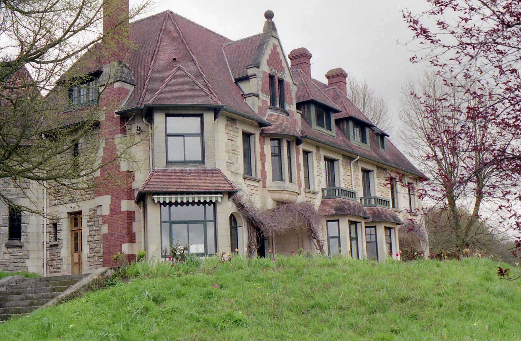 Maison des Champs à Luzarches (Val-d'Oise, Île-de-France, France).